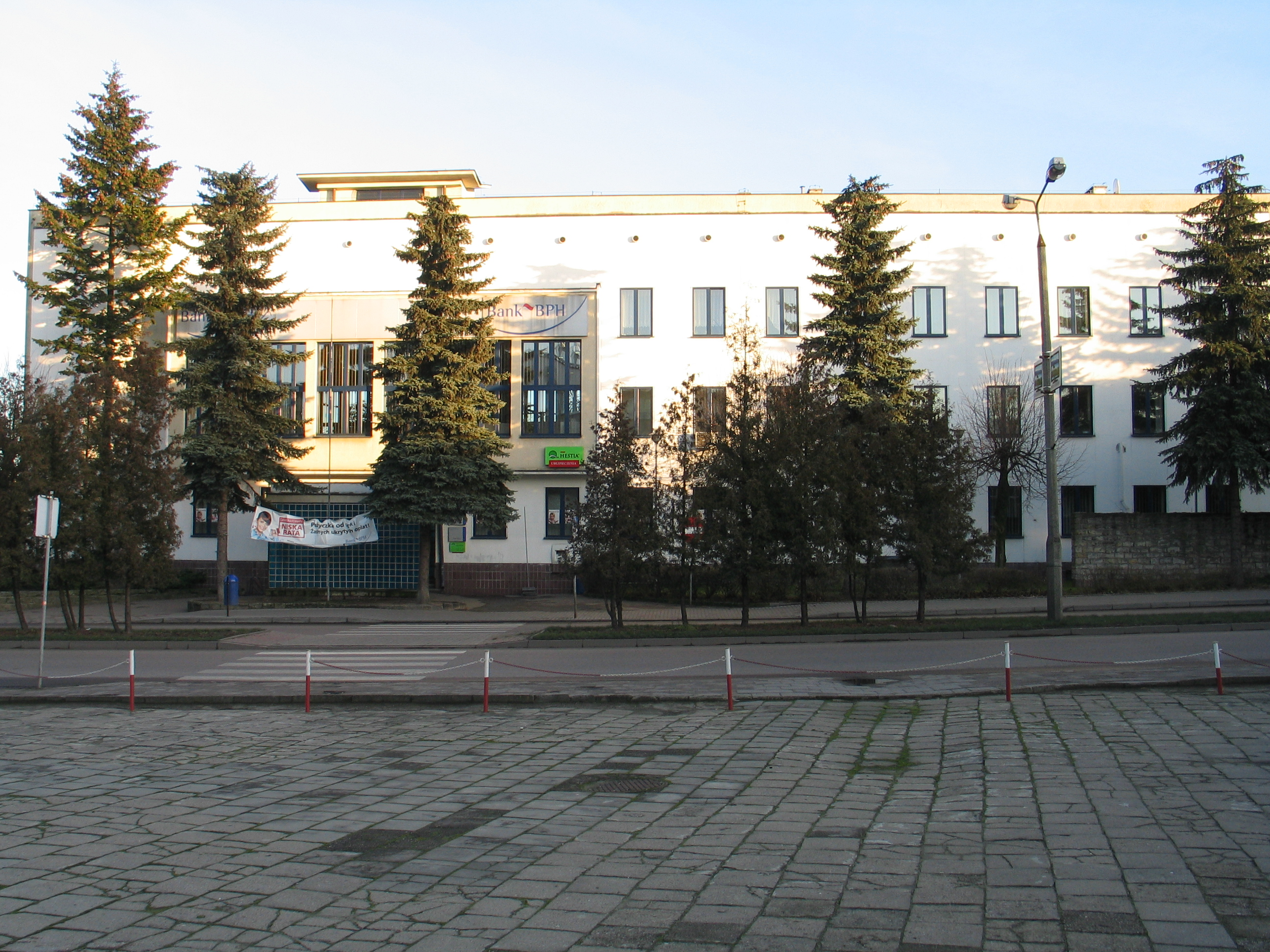 Modernistyczny budynek banku w Mławie przy ulicy Lelewela 6 lata trzydzieste XX w.